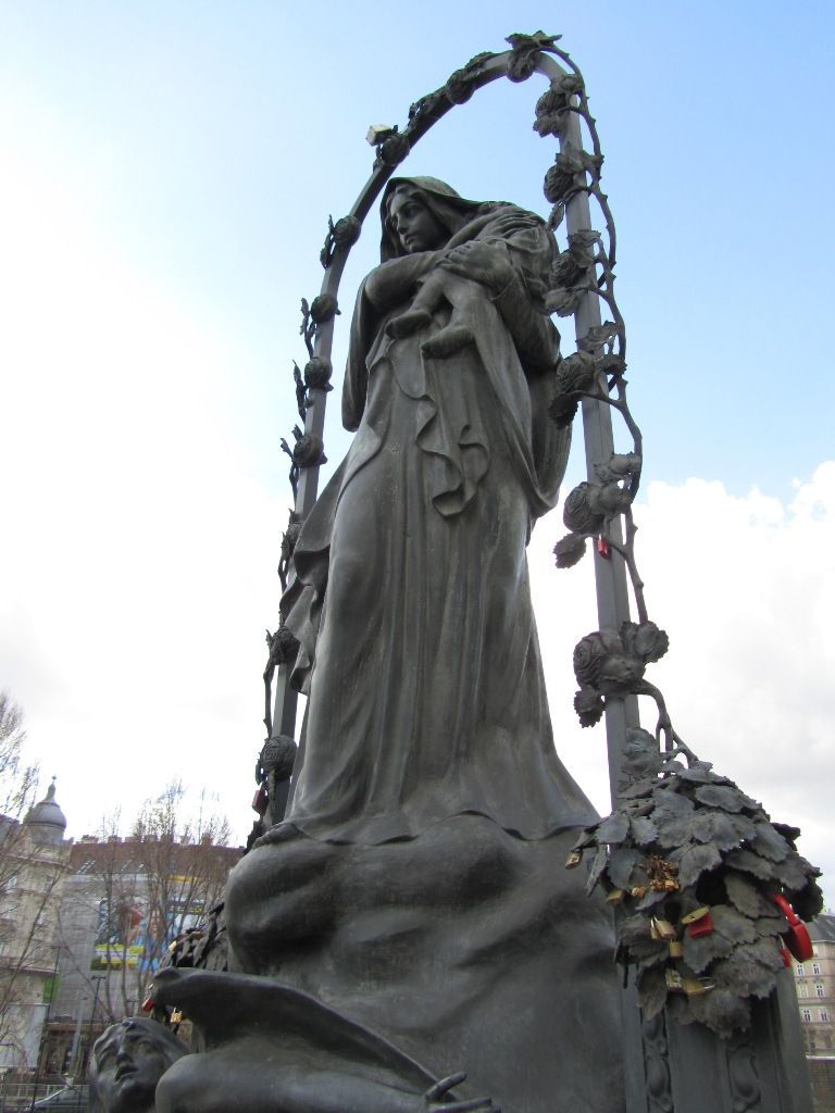 Marienstatue